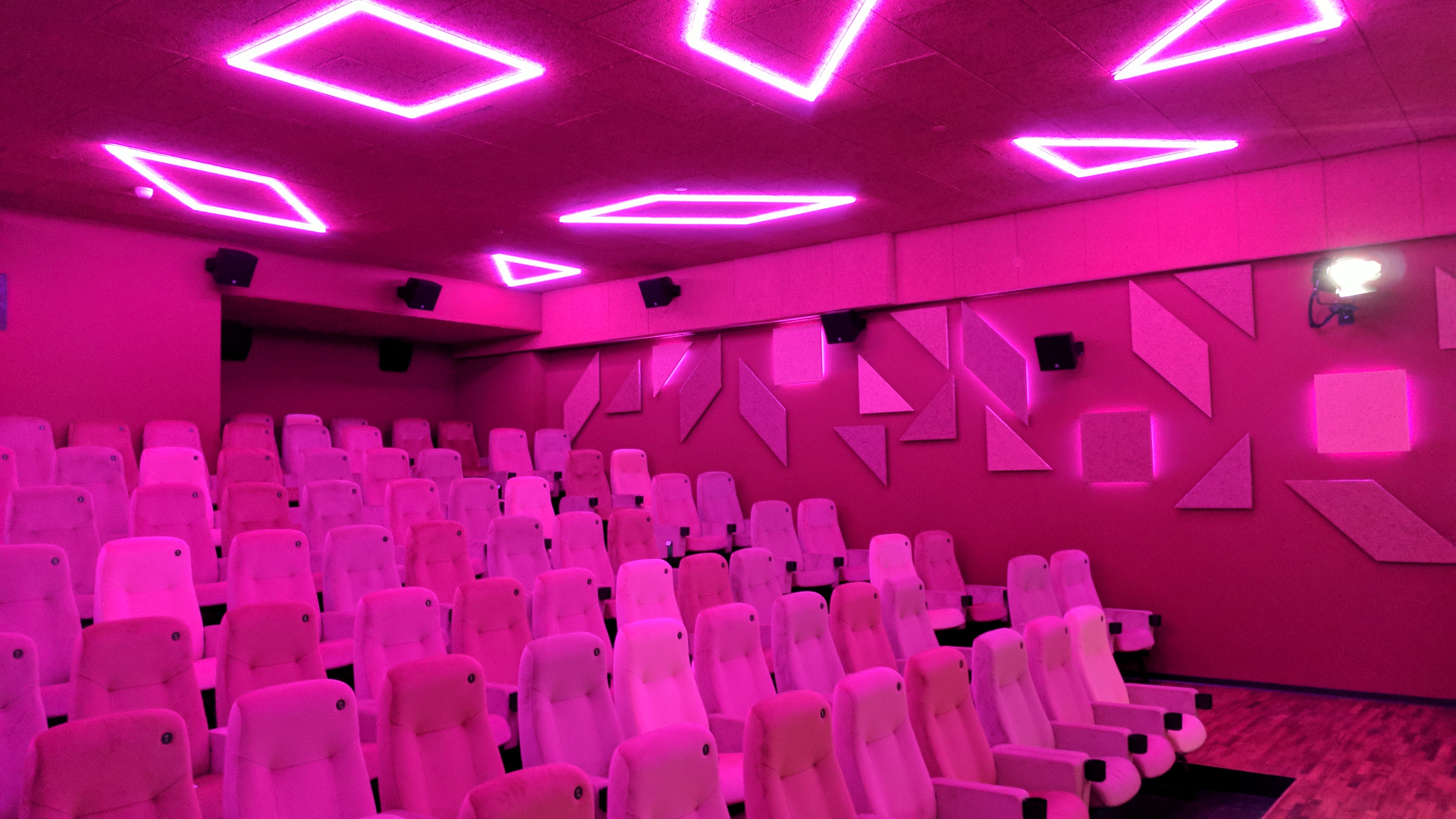 Saal 6 des Kino delphi LUX in Berlin.